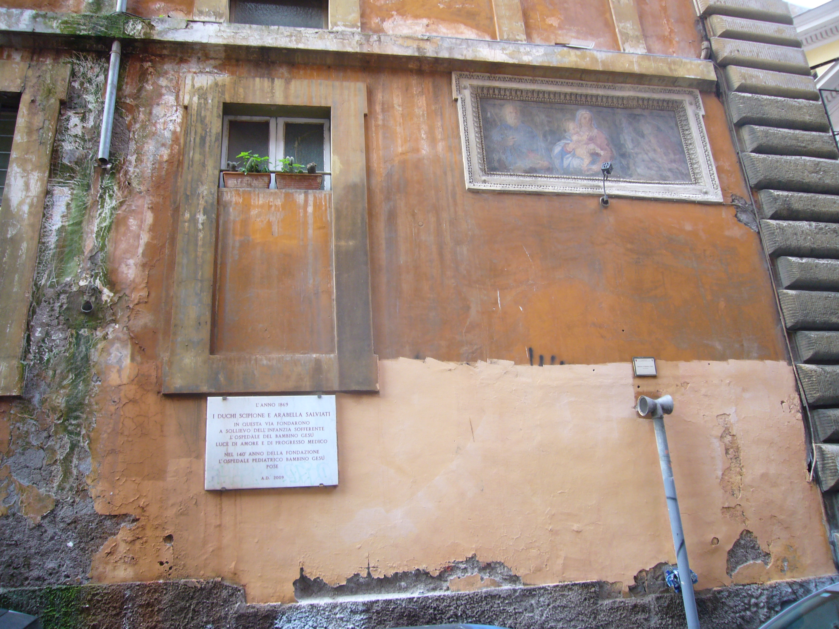 Roma, madonnella e memoria dei duchi salviati al conservatorio di via delle Zoccolette